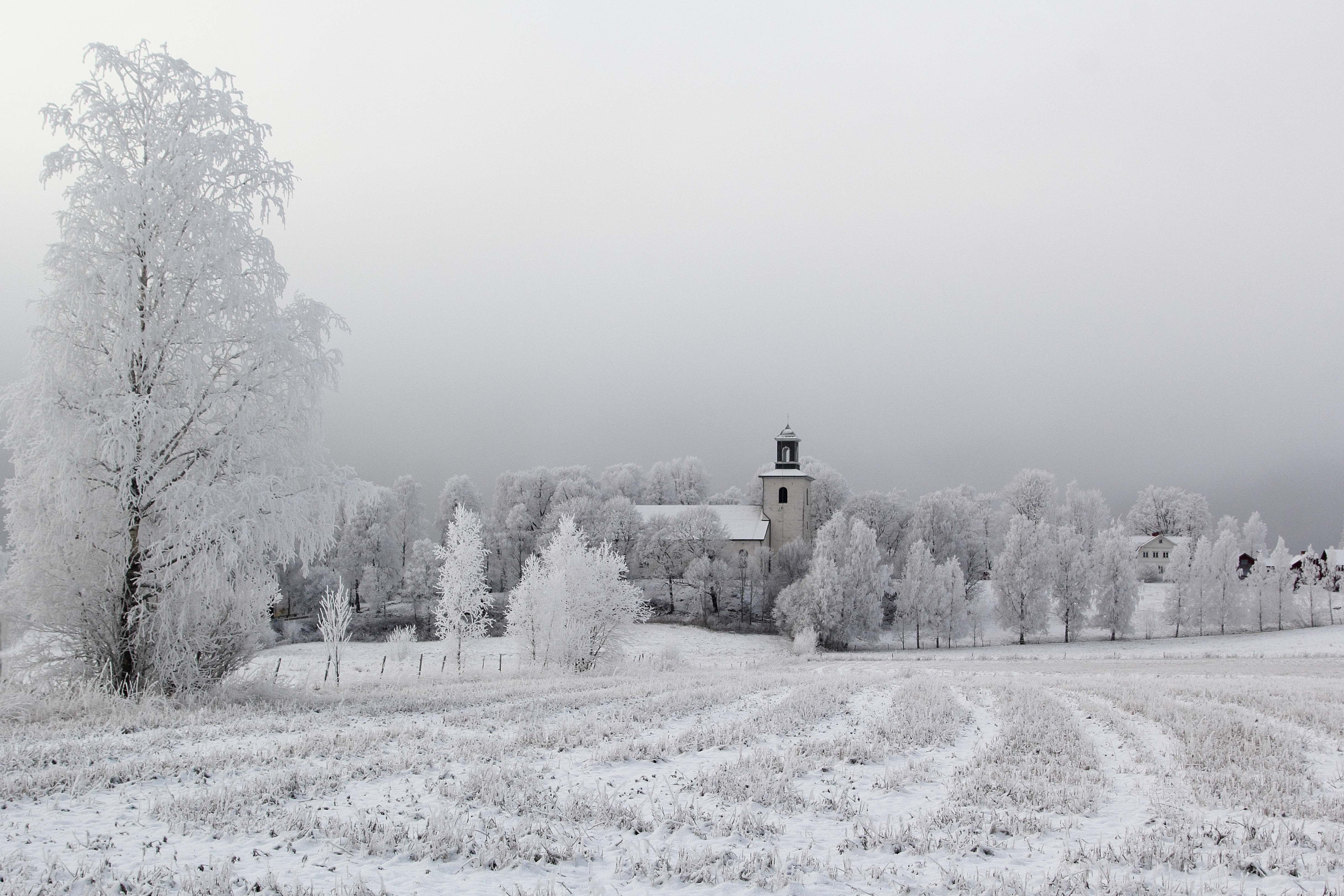 Östra Ämterviks kyrka (Ämterviks prästbol 3:42)